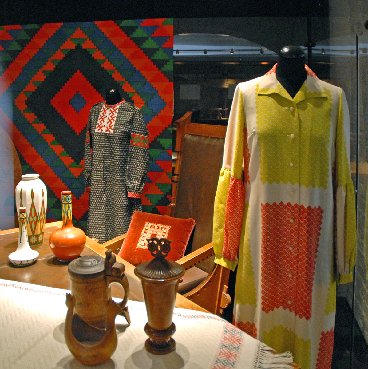 Objets finlandais, Musée de la Mode et du Textile